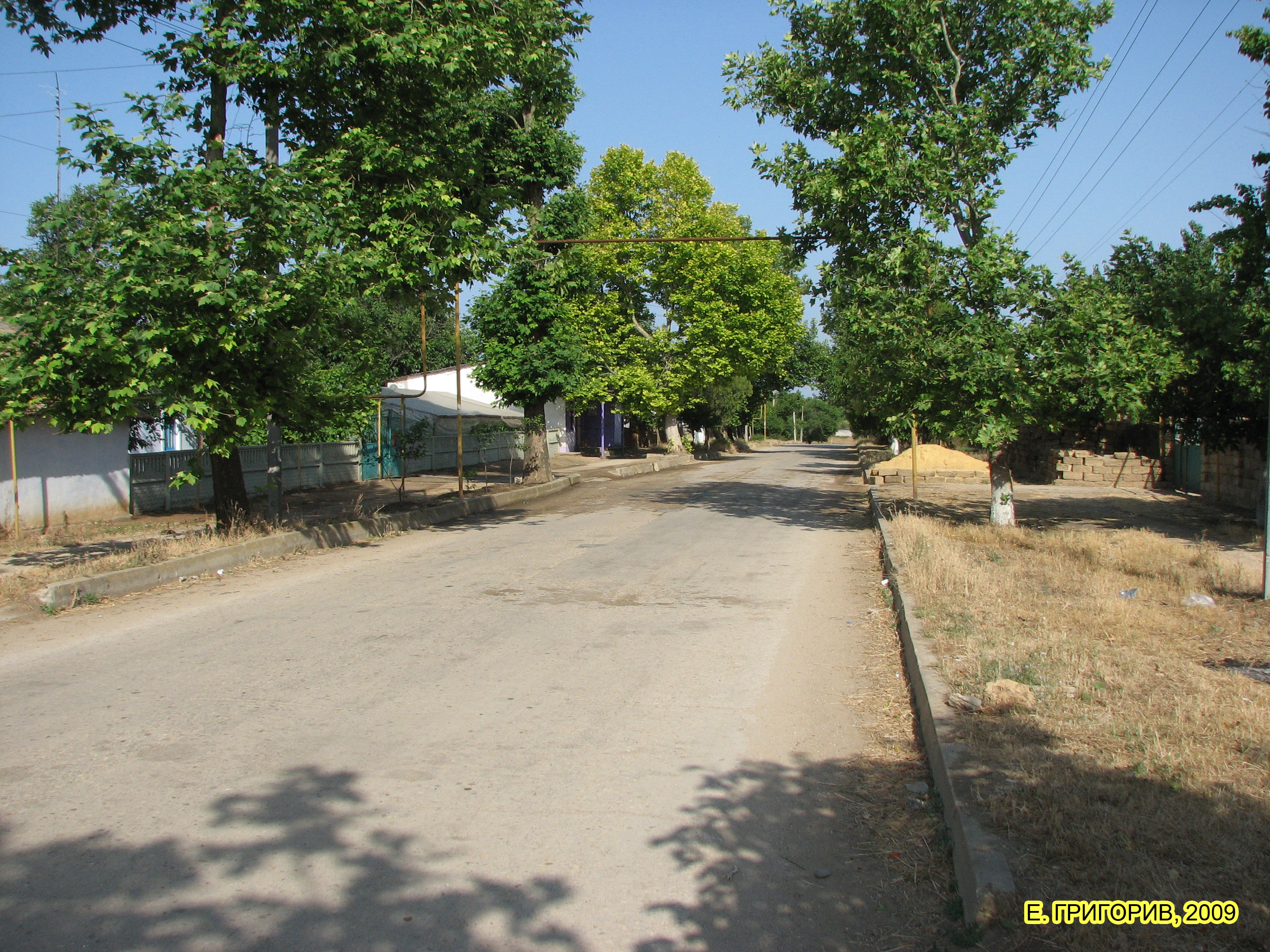 Улица Комсомольская, Ивановка, Сакский район